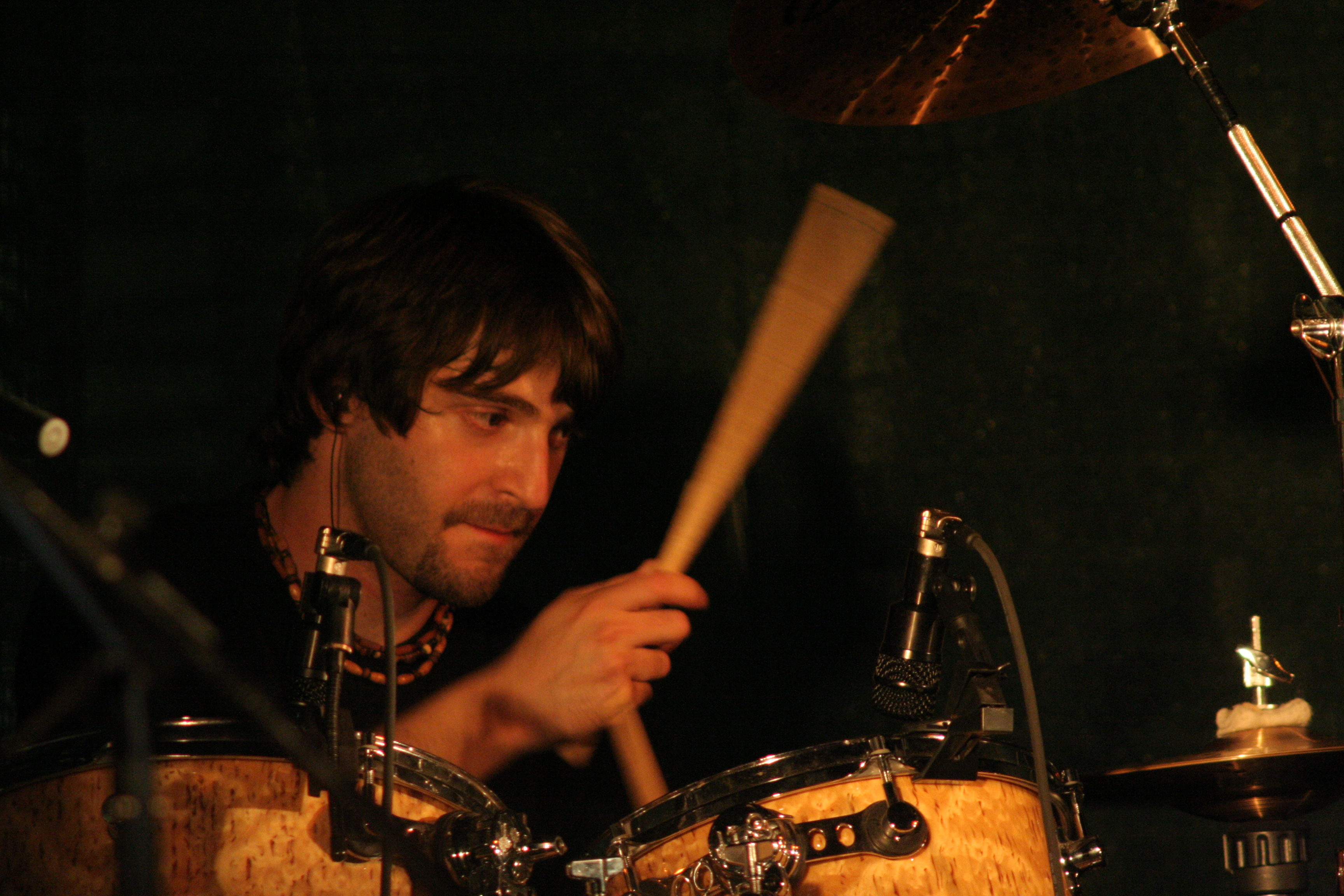 Roman Lomtadze, Čechomor concert